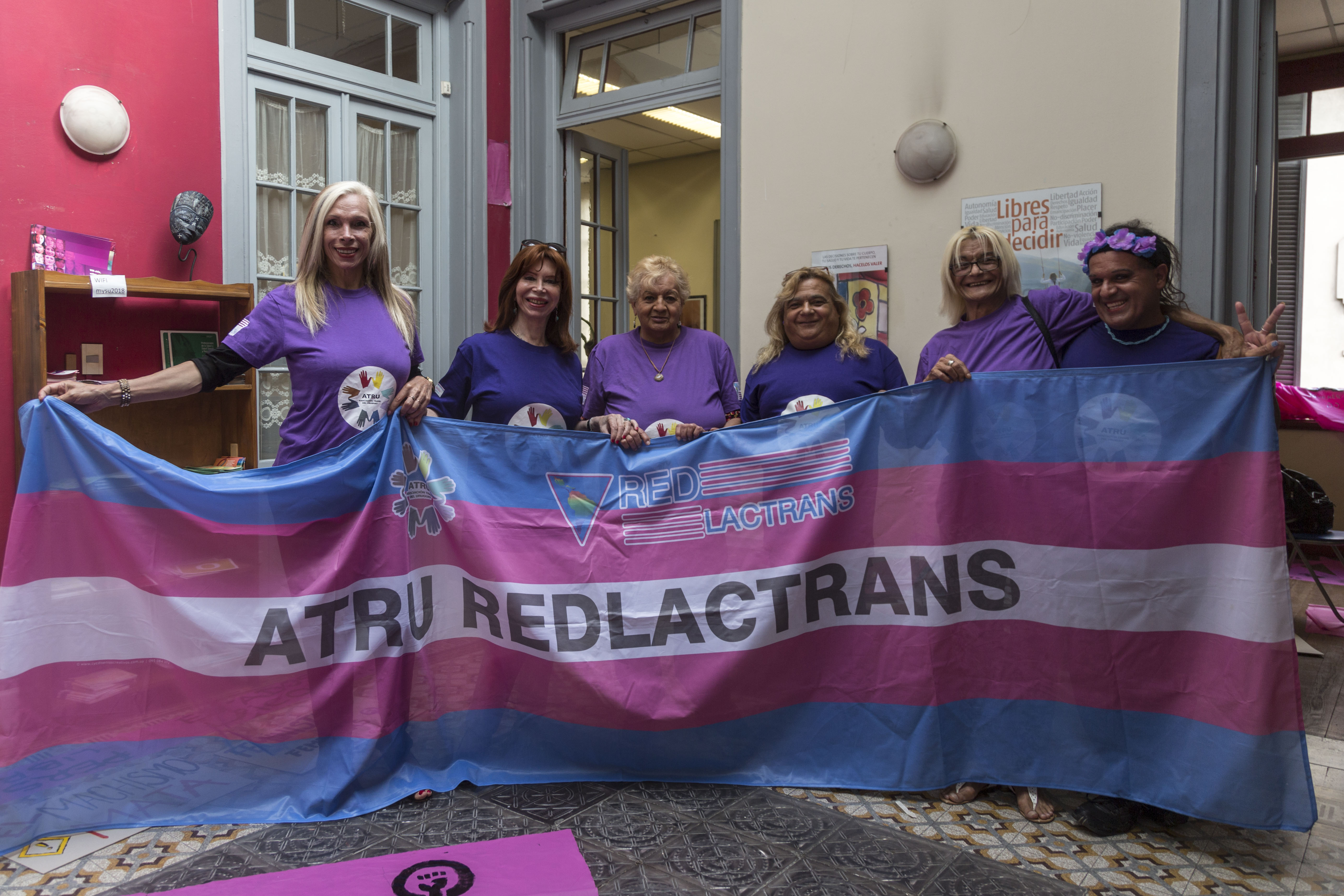 Preparativos en la Asociación Trans de Uruguay (ATRU) para la marcha del 8 de marzo de 2019. Montevideo, Uruguay.